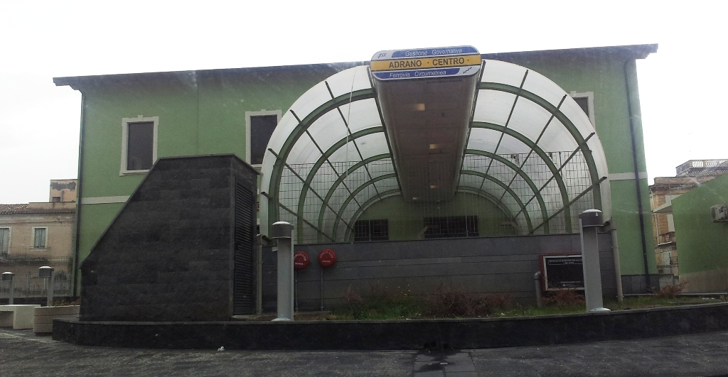 Nuova stazione di Adrano in provincia di Catania